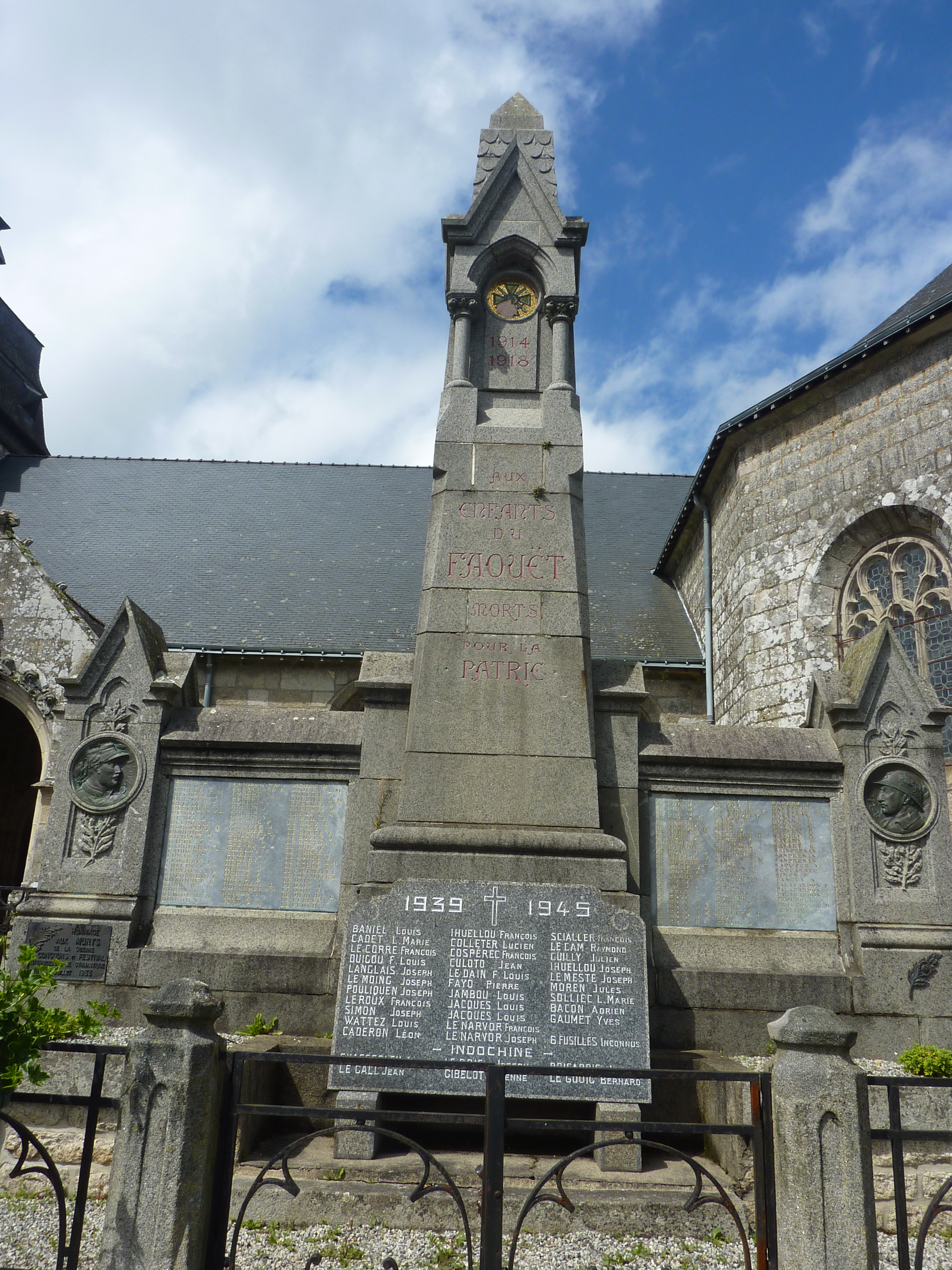 Le Faouët (Morbihan) : le monument aux morts